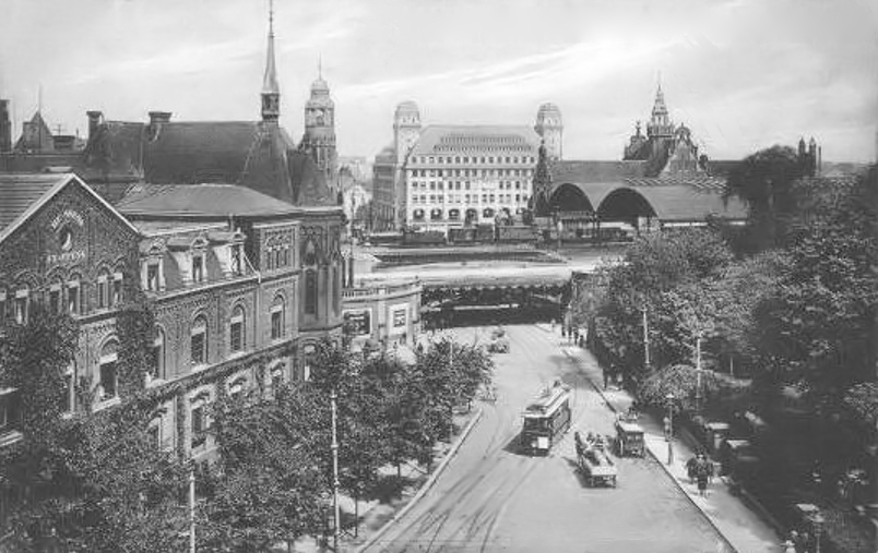 Huyssensstiftung, Handelshof und Hauptbahnhof in Essen um 1917